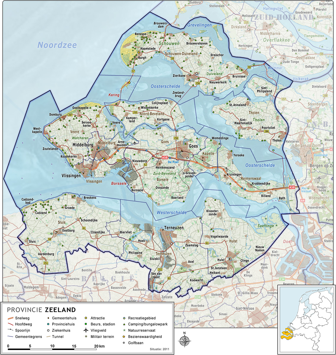 Provincie Zeeland, met indeling van gemeenten (2011) en impressie van het landschap. Door Jan-Willem van Aalst, samengesteld uit publiek beschikbare geo-data: Referentie-ondergrond (kustlijn, steden, wegen) gerasterd uit de OpenStreet Map OSM. ( Inhoud is beschikbaar onder de Creative Commons Attribution-ShareAlike 3.0 license. Referentie-ondergrond op water bewerkt vanuit Gebruik is vrij met bronvermelding NLR en ESA. Vectorgrenzen van gemeenten en regio's vrij ter beschikking gesteld met dank aan cartografen van brandweerregio's Hollands-Midden en IJsselland; gerasterd in Photoshop. Hoogte-aanduidingen (reliëf) gerasterd uit de AHN Viewer ( gebruik is vrij met bronvermelding (c) AHN, Locaties verblijfsrecreatie (campings) op basis van Borisweb ( van Kenniscentrum recreatie. Gebruik is vrij, met bronvermelding. Overige kenmerken op de kaart: eigen tekenwerk van Jan-Willem van Aalst, op basis van gerasterde gemeentegrenzen.